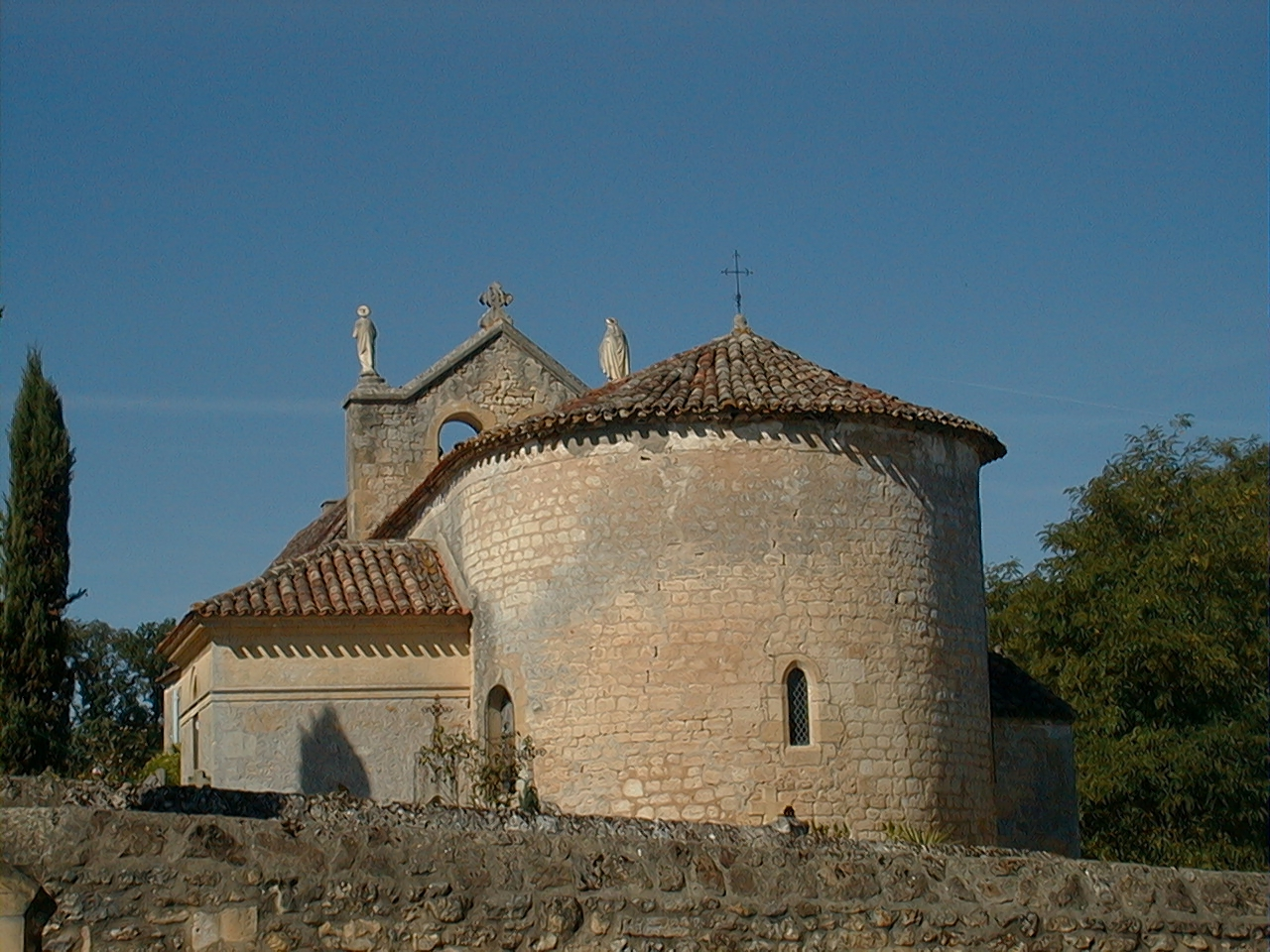 Eglise de Bourniquel